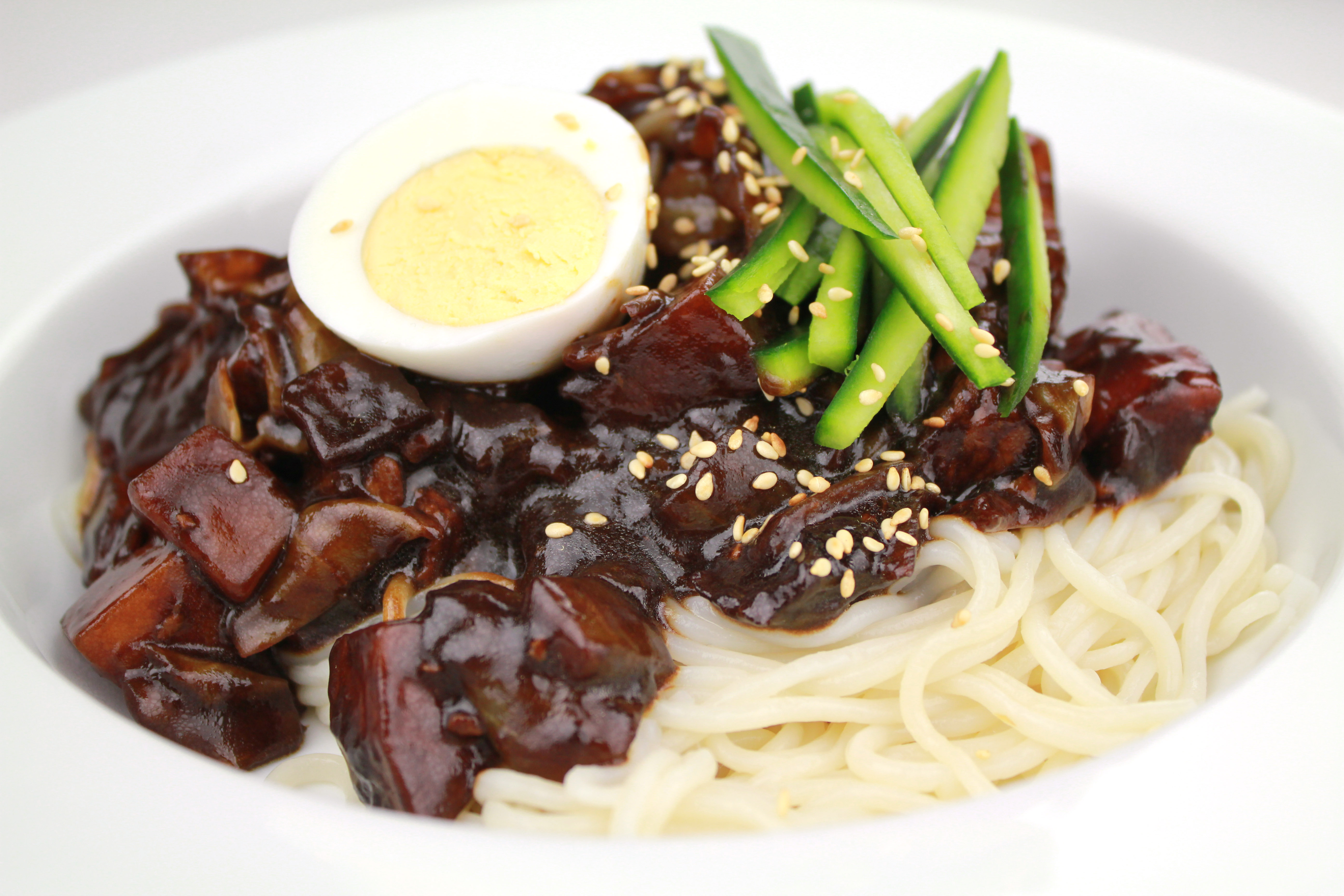 Jajangmyeon